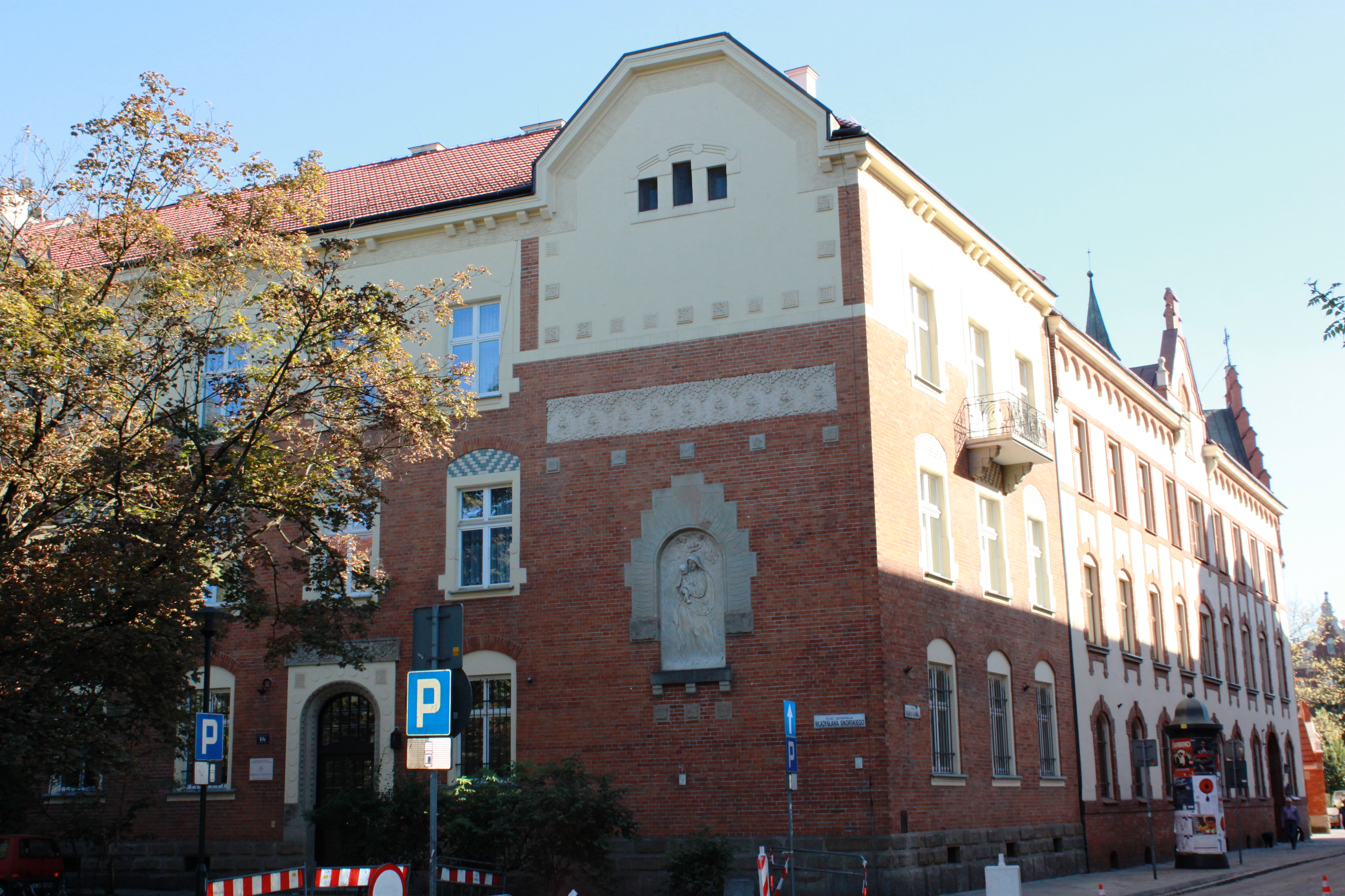 Zespół klasztorny sercanek. Kraków, pl. Sikorskiego 14 i ul. Garncarska 24.